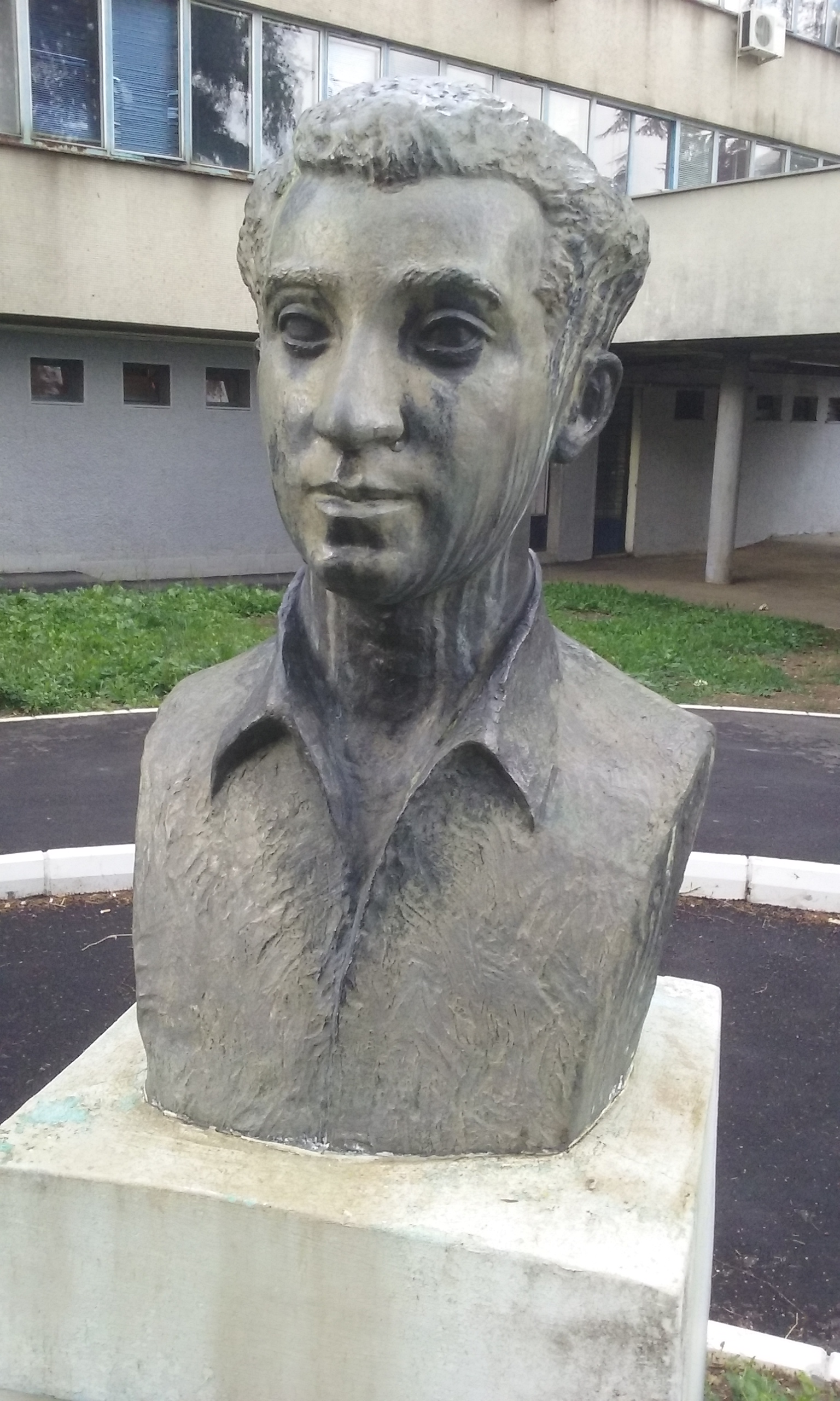 Споменик Душану Јерковићу у насељу Браћа Јерковић у Београду.